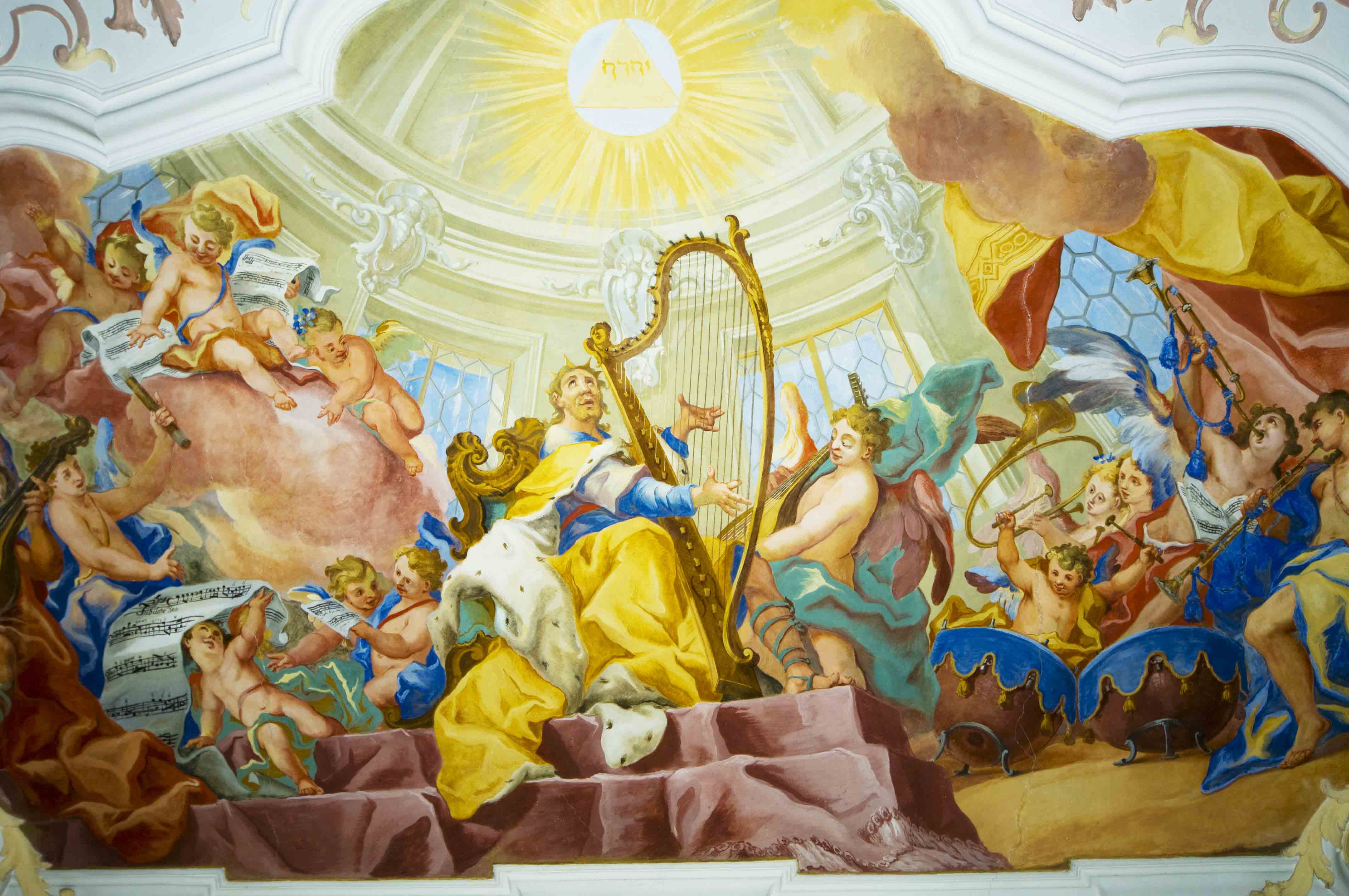 Kloster Reichenbach Innenansicht Fresko